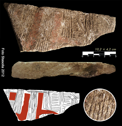 Lamina calcarea graffita e decorata in ocra, da Grotta San Pellegrino (Laterza). Paleolitico sup. Epigravettiano Finale (11-10 mila anni fa). Foto, Vincenzo Stasolla. Fonte da: [ V. STASOLLA, Tecnologia della preistoria. Gestione delle materie prime, produzione e aspetti tecno-tipologici delle industrie litiche di Grotta San Pellegrino (Laterza) e dei Settori limitrofi (A-F), Università degli Studi di Bari a.a. 2012-2013, ed. pubb. 2014. ISBN